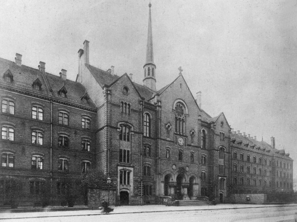 Das Johannishospital in der Hospitalstraße (heute Prager Straße), um 1910